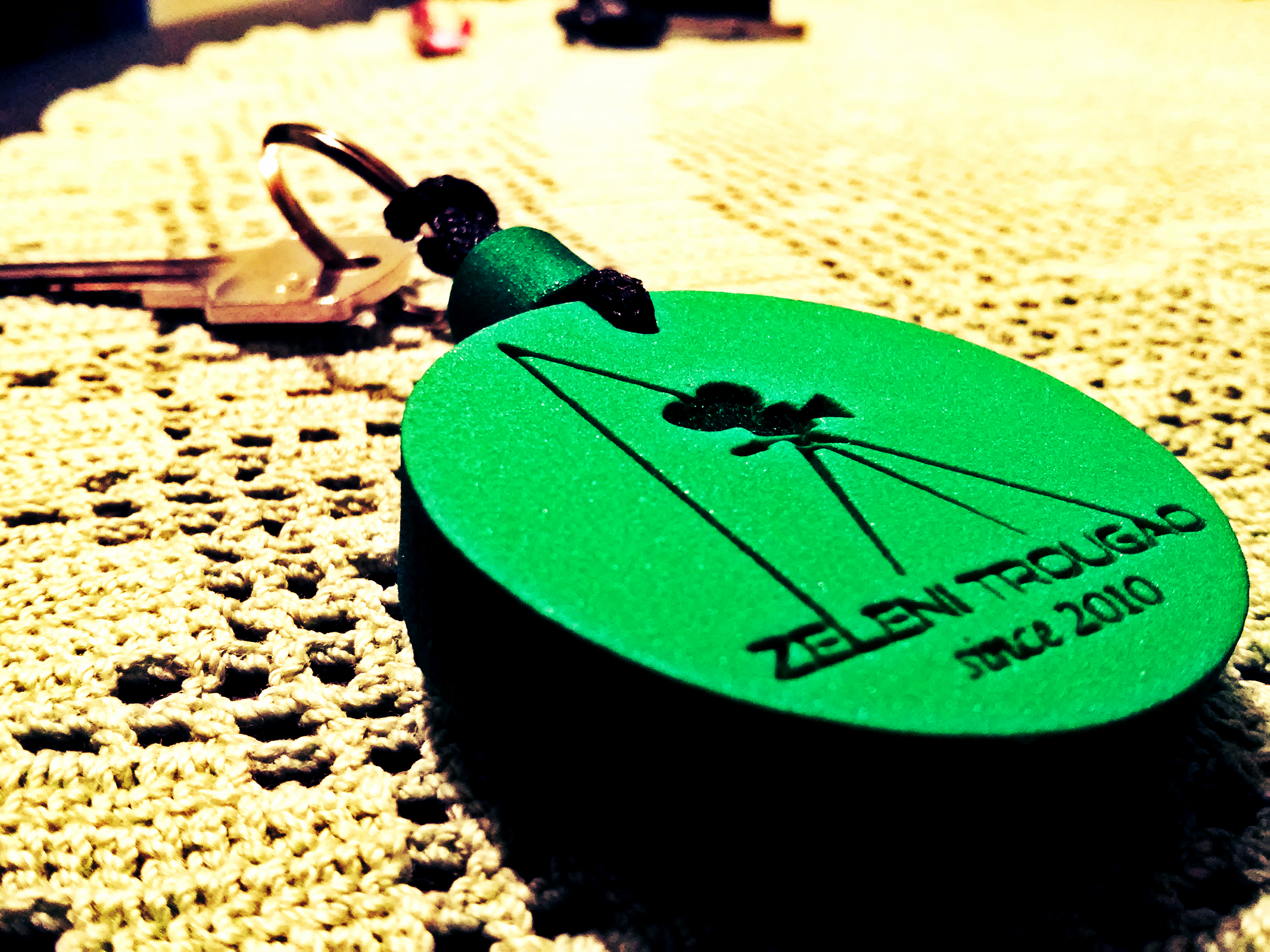 Zeleni trougao